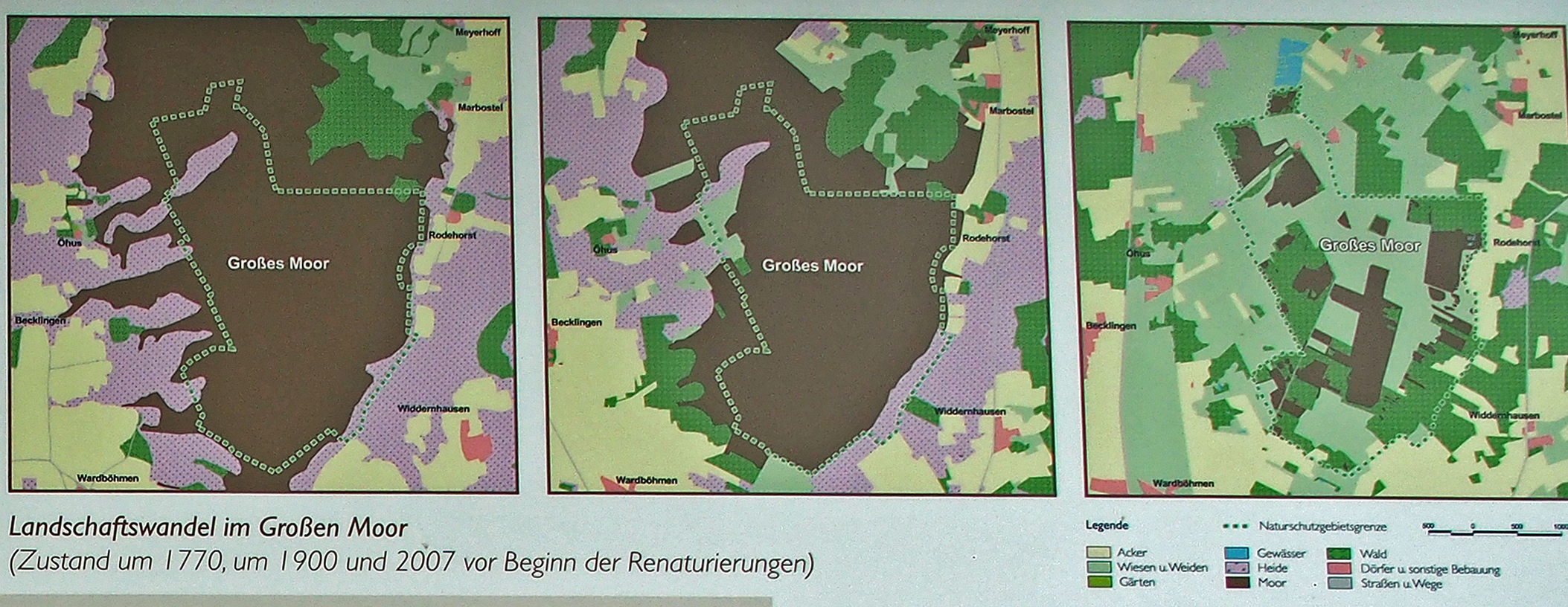 Entwicklung des Großen Moores bei Becklingen um 1700, 1900 und 2007 Ausschnitt aus einer Infotafel des NLWKN im NSG